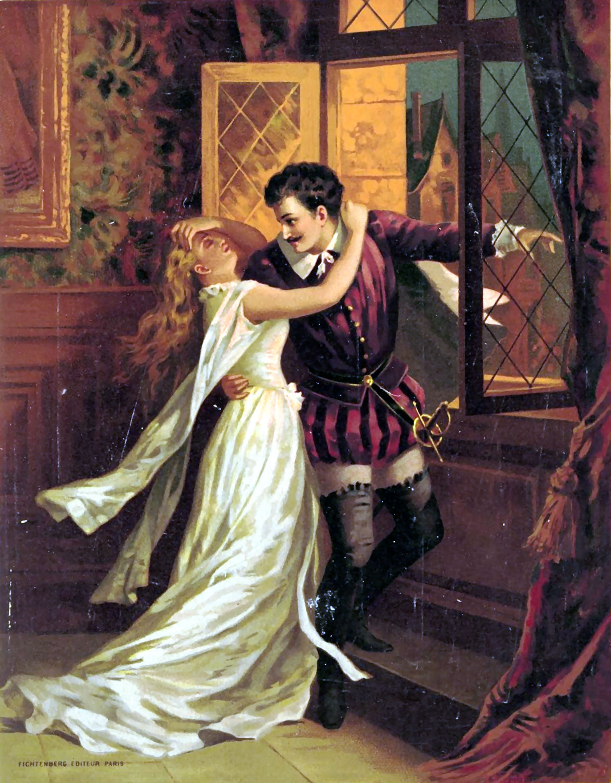 Duo Raoul de Nangis-Valentine des Huguenots de Giacomo Meyerbeer, Fichtenberg éditeur, Paris, 1836